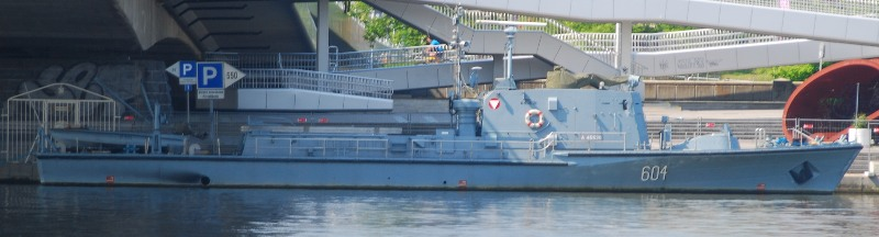 Das ehemalige Patrouillenboot "Niederösterreich" des österreichischen Bundesheers bei der Reichsbrücke in Wien